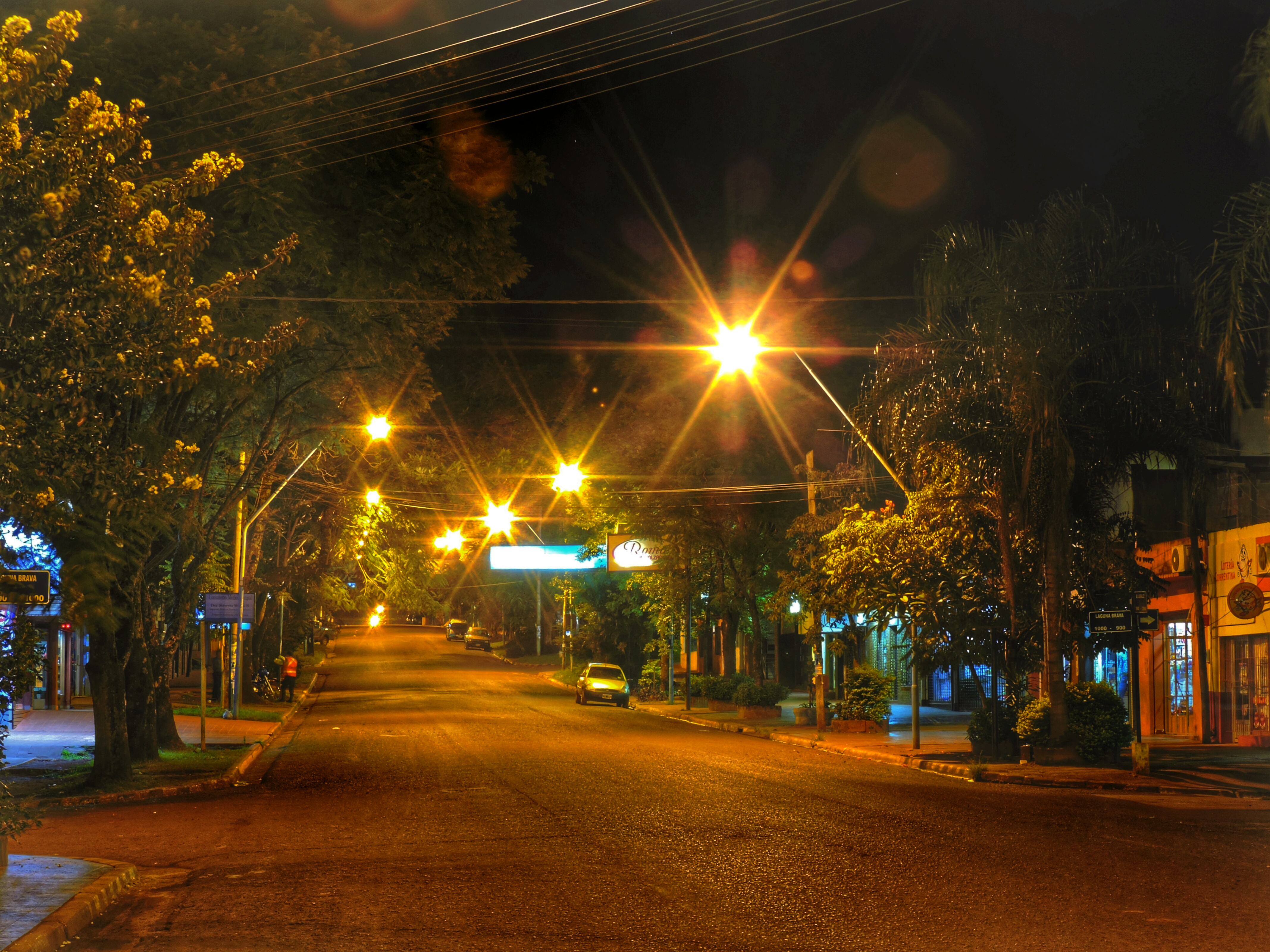 Av.Lavalle